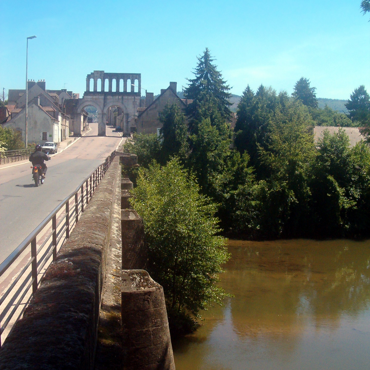 L'Arroux à Autun, près de la Porte d'Arroux.